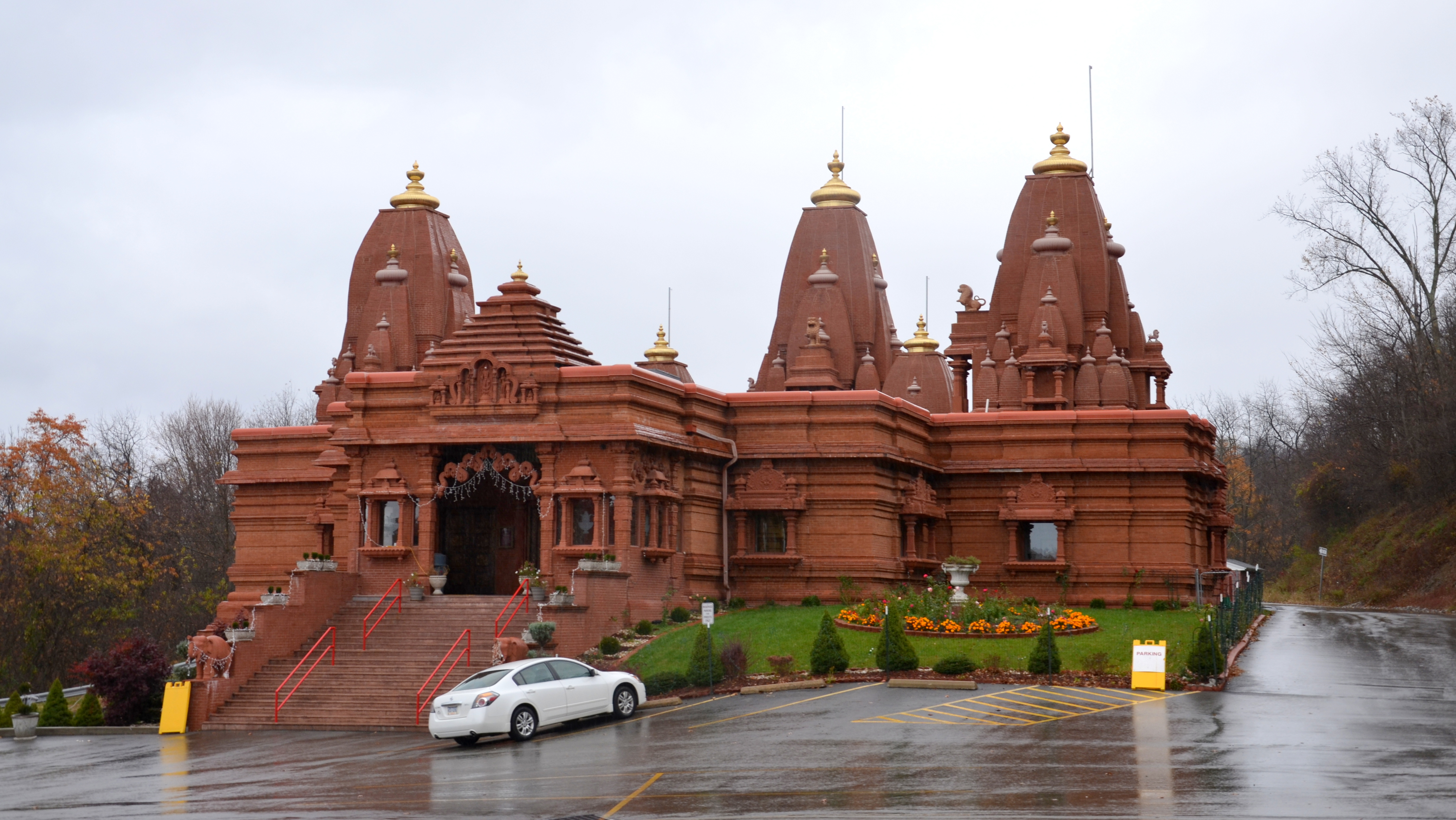 Hindu Jain Temple, Monoroeville, PA, USA.